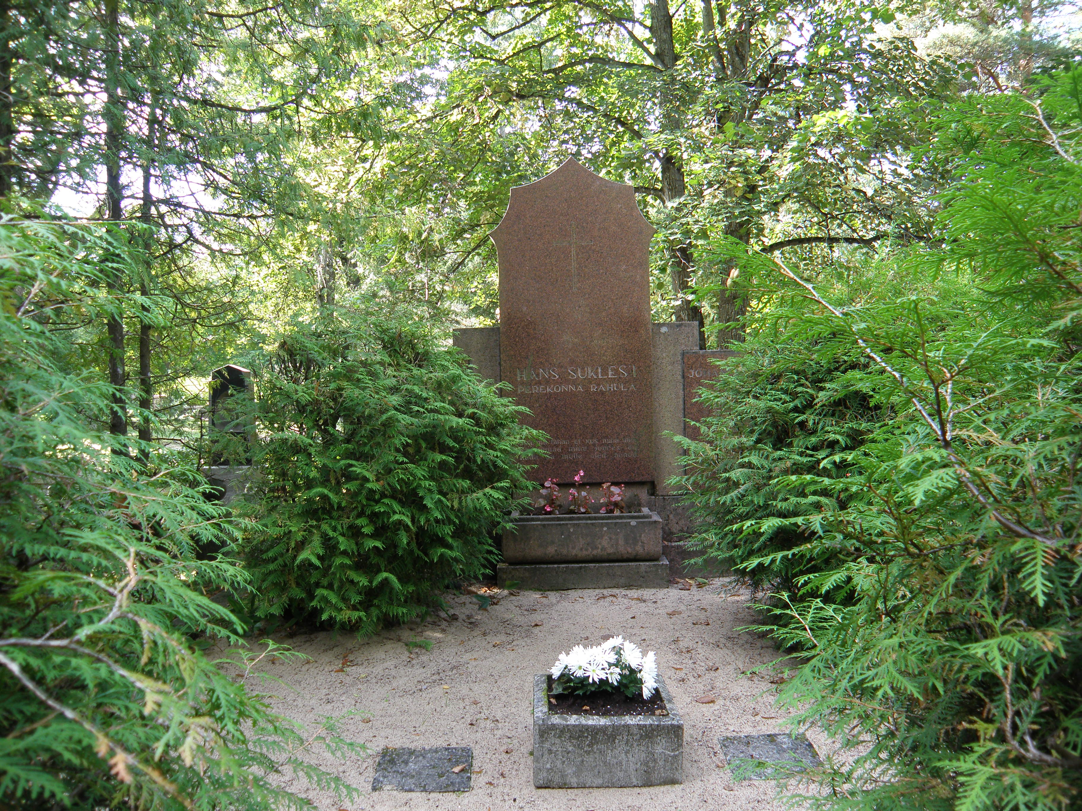 Hans Suklesi hauakujundus